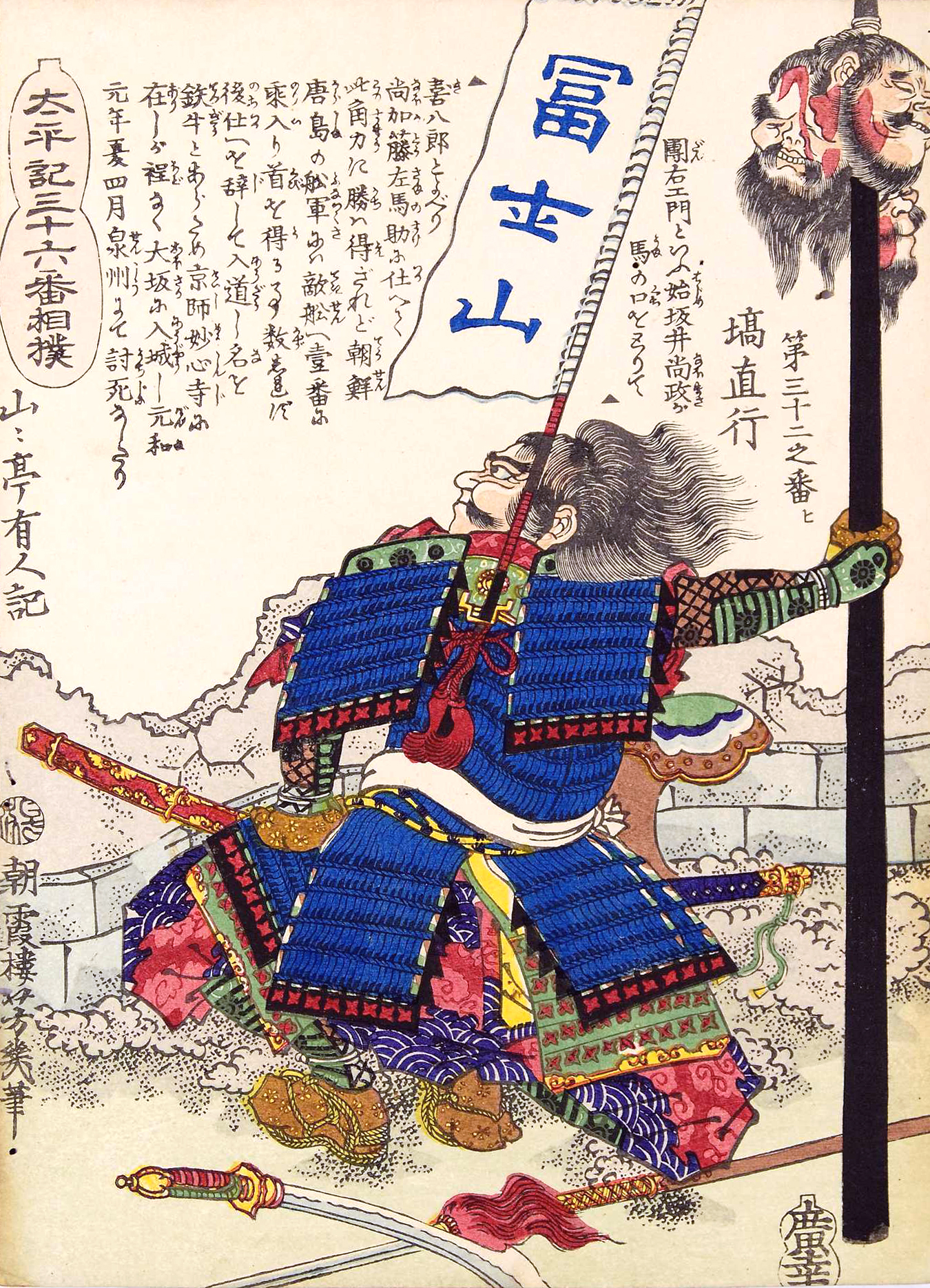 太平記三十六番相撲：第三十二之番「塙直行」